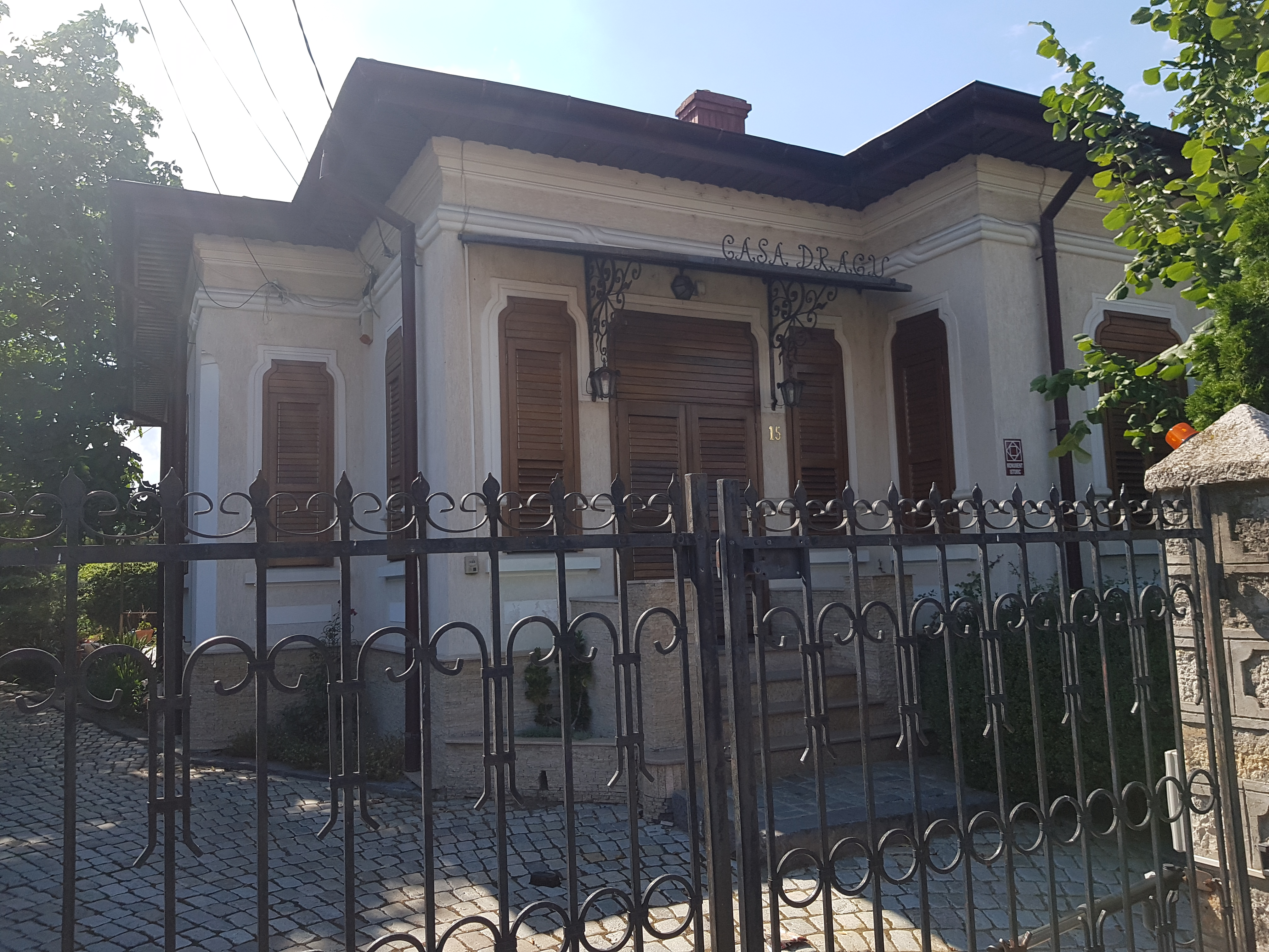 Monument istoric